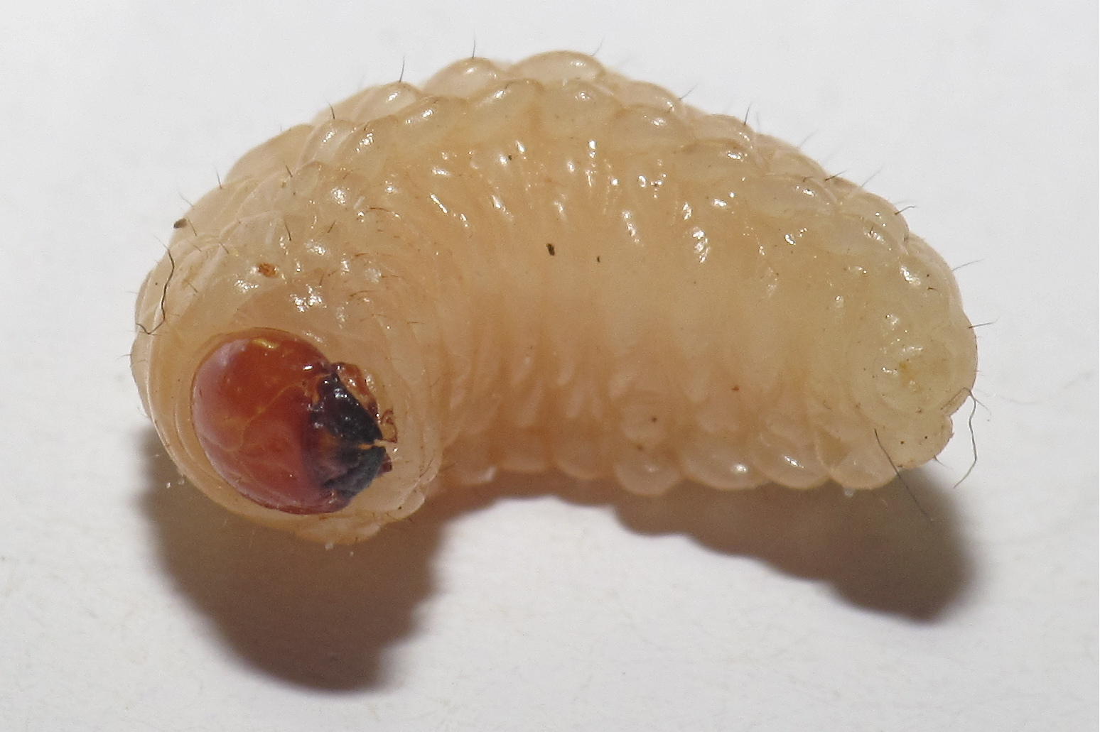 Larva de curculiónido dentro dunha castaña